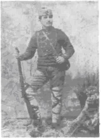 Атанас Албански.